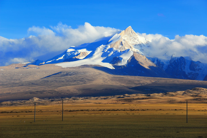 希夏邦马峰，摄于2012年6月7日